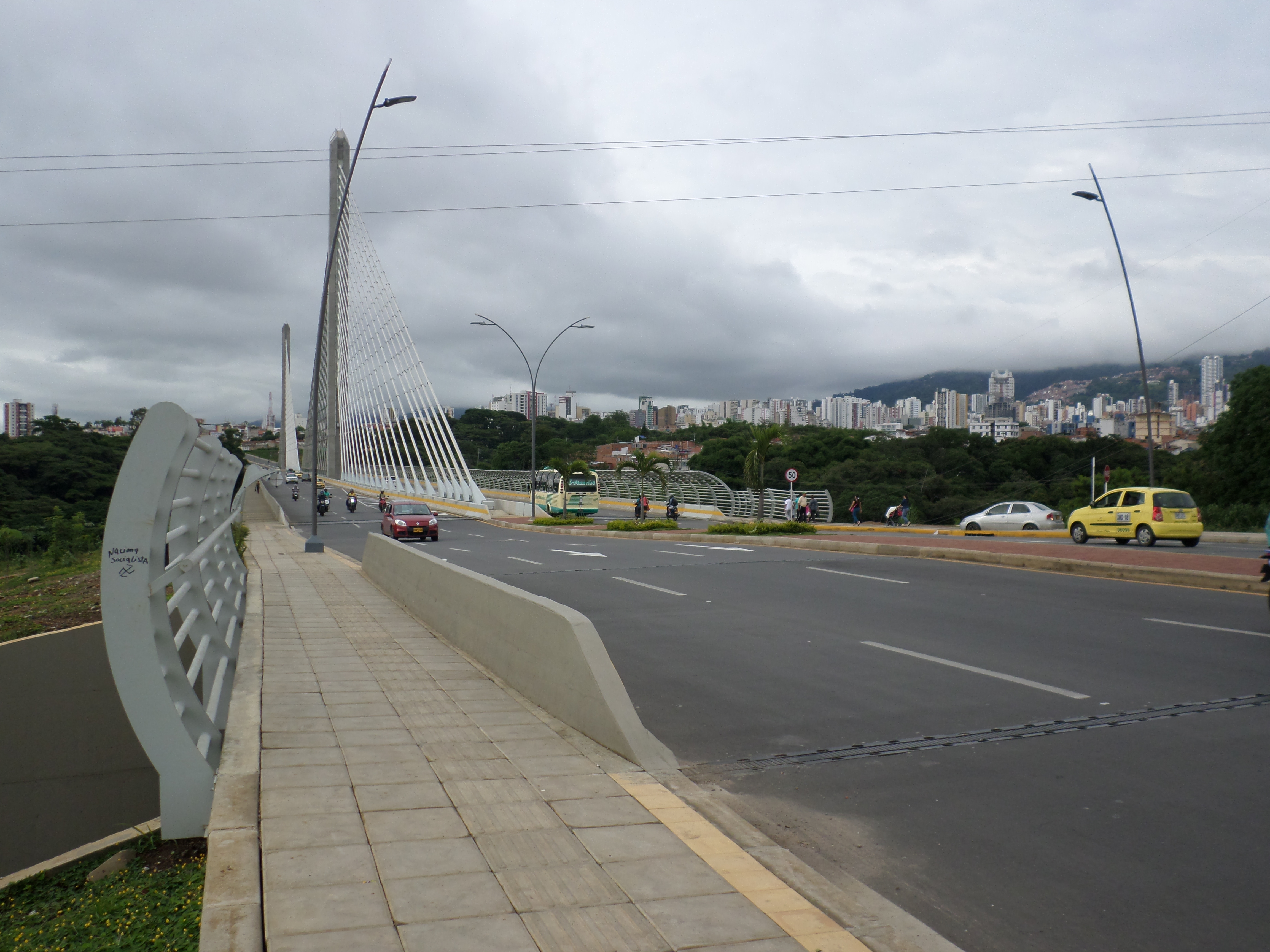 Pilar del puente 9a Bmanga